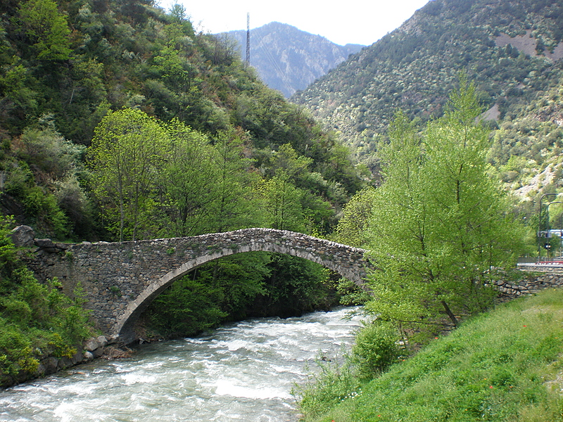 Pont de la Margineda (Santa Coloma)